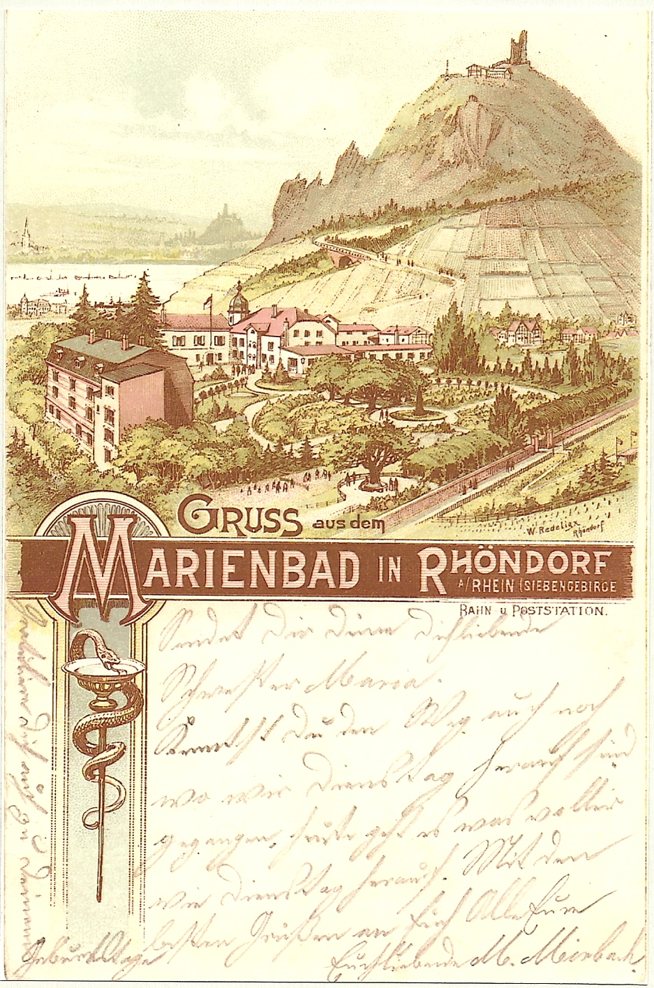 "Euteneuersche Anstalt", Rhöndorf am Rhein, Ende 19. Jhdt. Mitte: Haus Kemenate, links: das spätere Mütterkurheim St. Hedwig rechts Drachenfels, hinten Godesburg